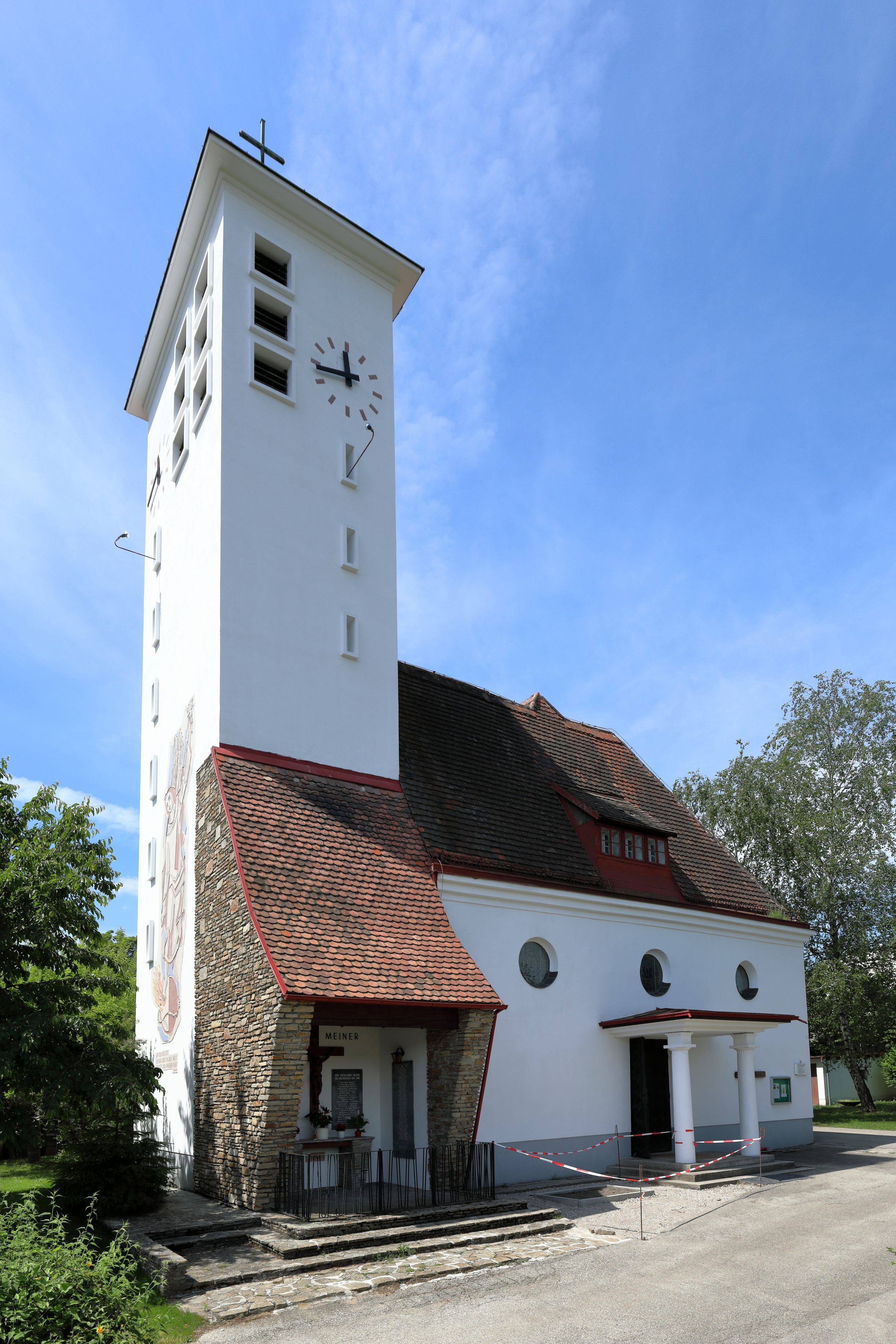 Ostansicht der röm.-kath. Pfarrkirche hl. Lorenz in der niederösterreichischen Marktgemeinde Gablitz.1928 als Kriegergedächniskirche unter Einbeziehung des barocken Vorgängerbaues von 1642 (quer gelagerte Vorhalle) errichtet. 1963 erfolgte der Zubau des Kirchturmes und die Errichtung des Kriegermahnmales an dessen Nordostseite.